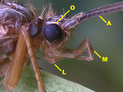 Na imagem, estão indicadas as estruturas: palpo maxilar (M), palpo labial (L), antenas (A) e olhos compostos (O)